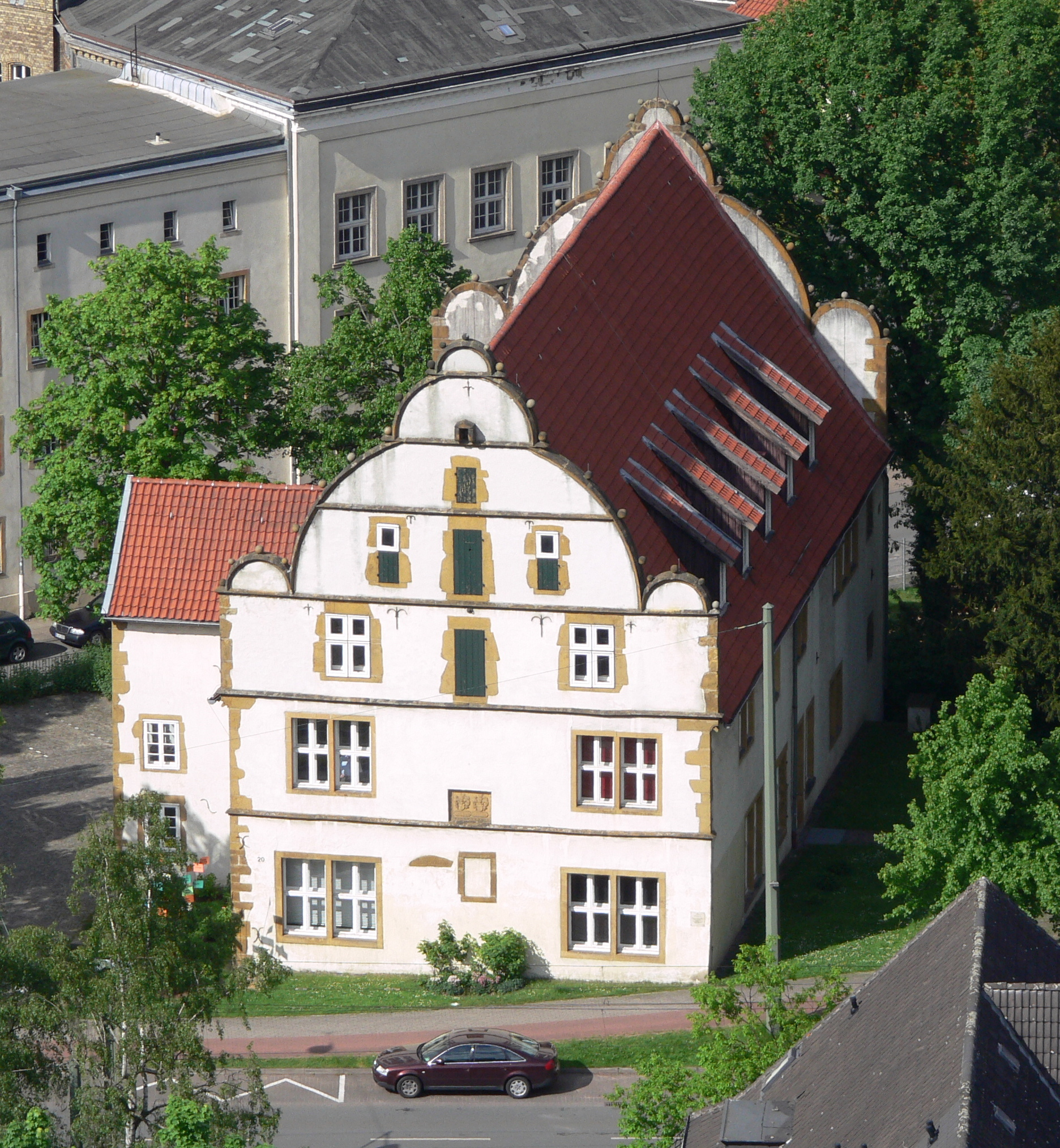 Bielefeld, Kreuzstraße 20, Naturkunde-Museum (namu), im Gebäude des historischen Spiegel'schen Hof (1540); fotografiert von der Sparrenburg